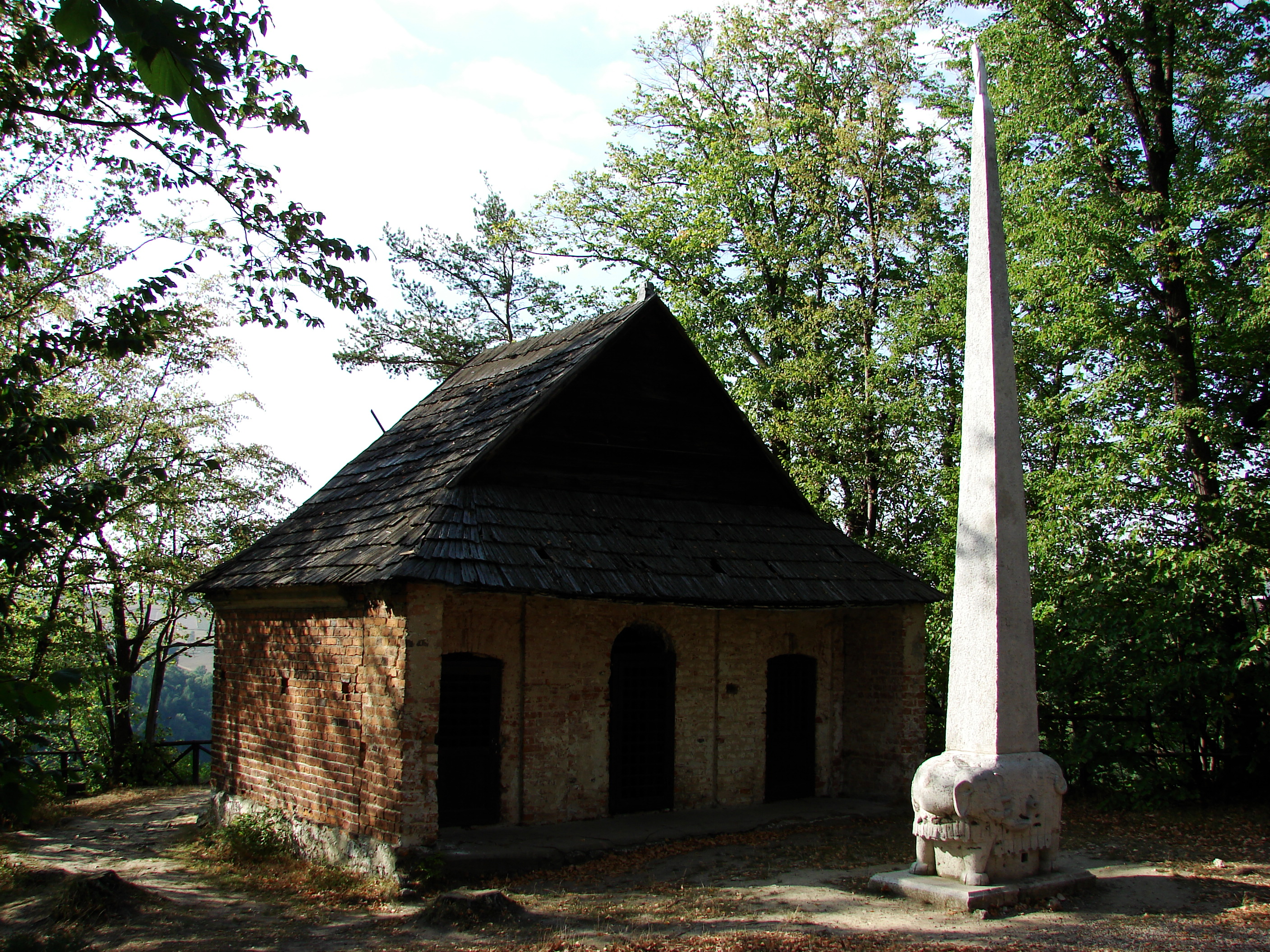 Groty Modlitewne w Grodzisku na zachód od Skały